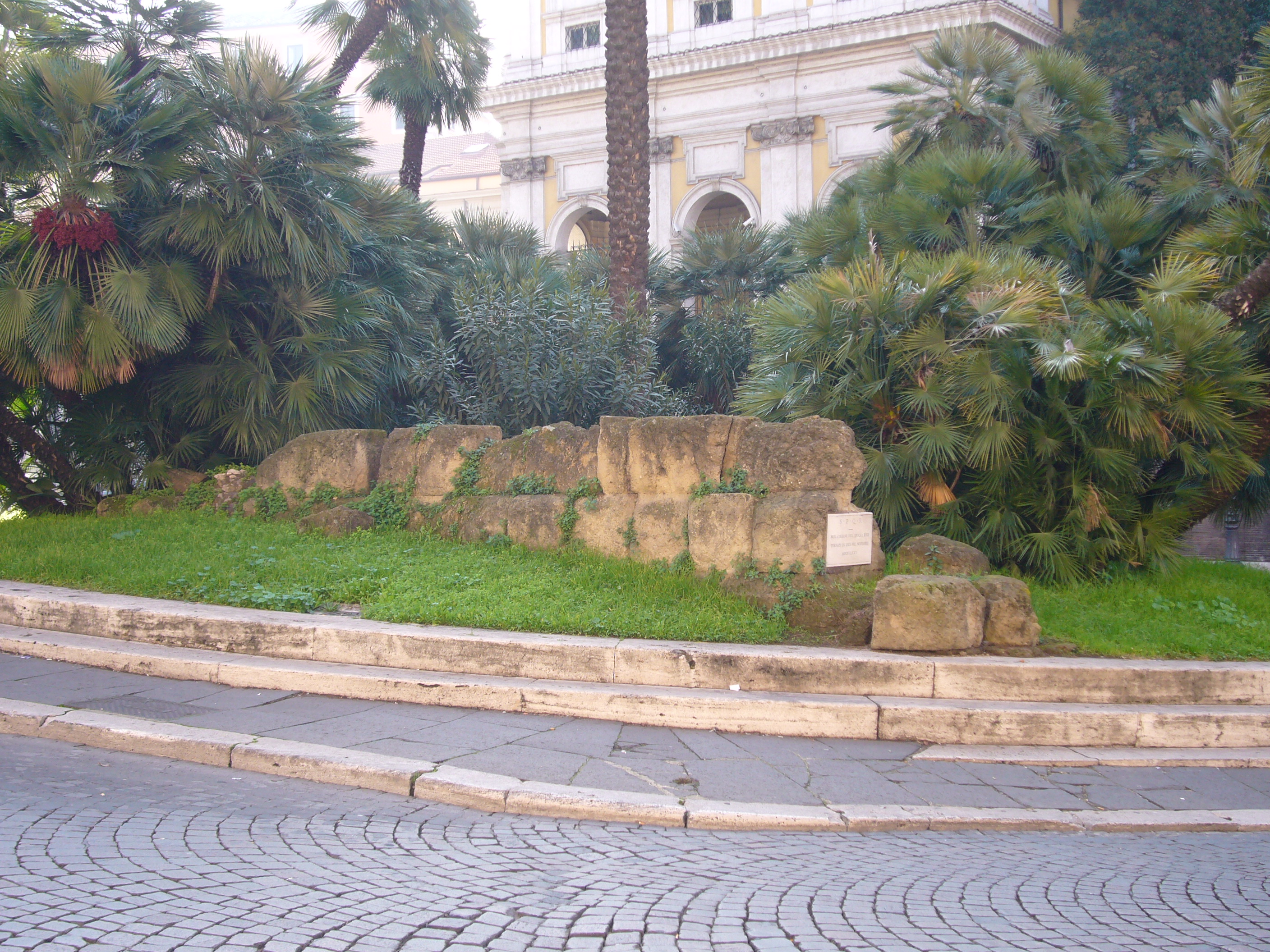 Roma, mura serviane a Magnanapoli (Porta Sanqualis)